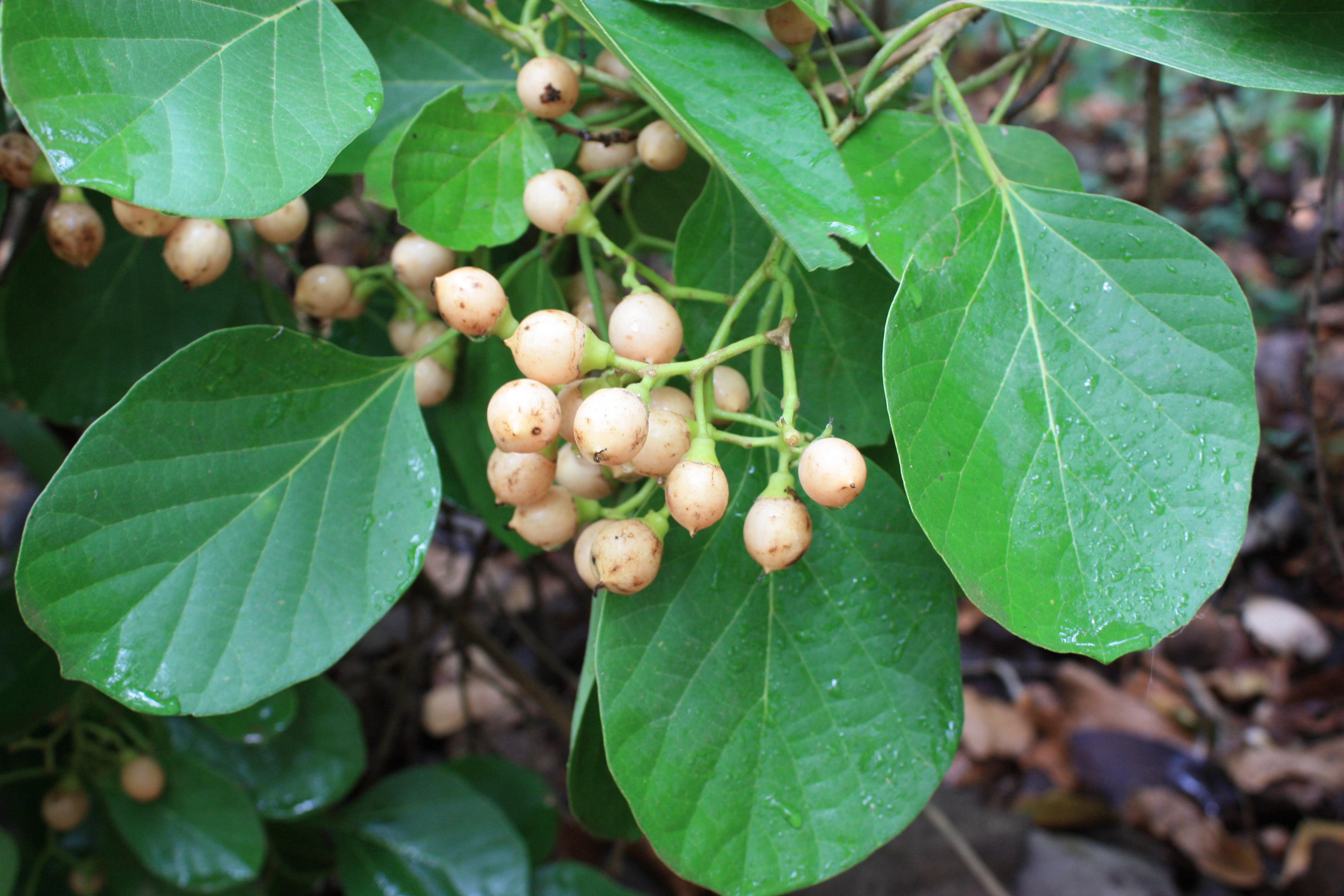 Cordia myxa, SW Burkina Faso